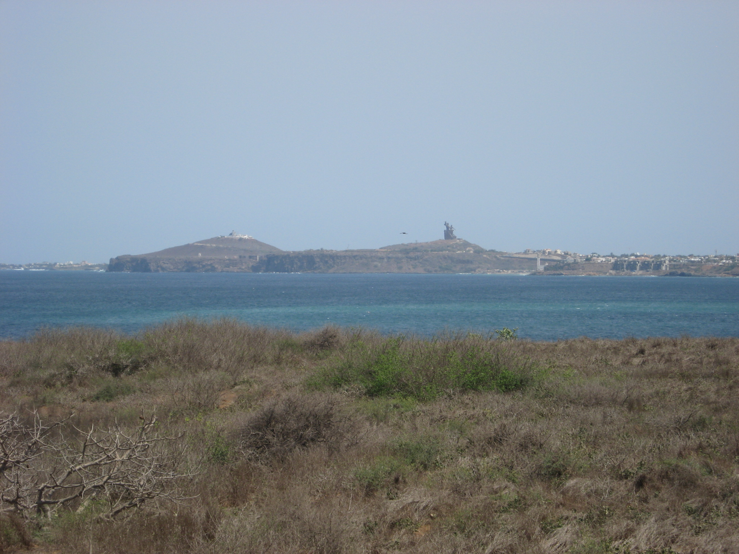 Dakar - Collines des Mamelles (vues depuis les îles de la Madeleine) : à gauche le phare, à droite le monument de la Renaissance africaine